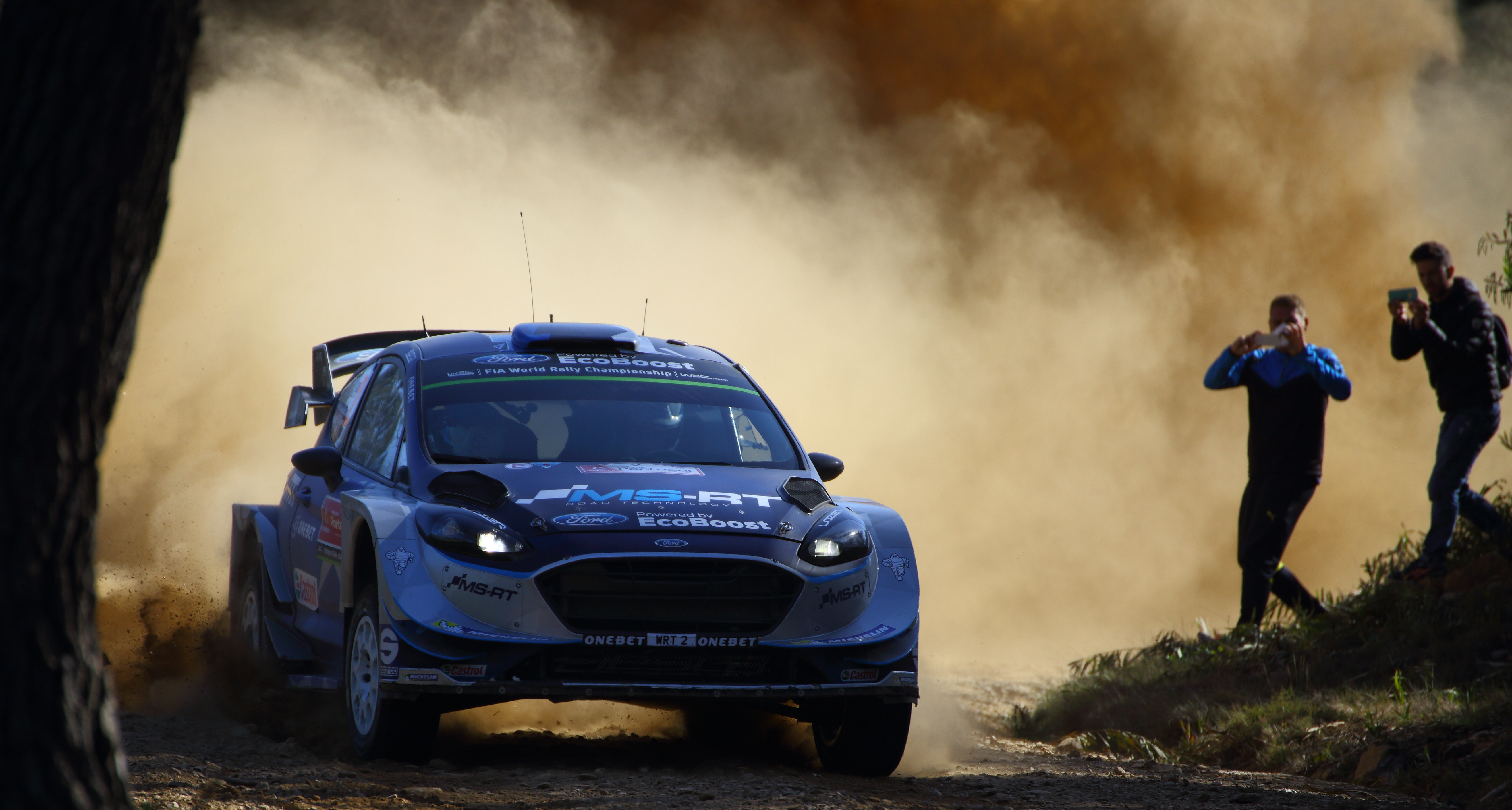 2017 Rally Portugal